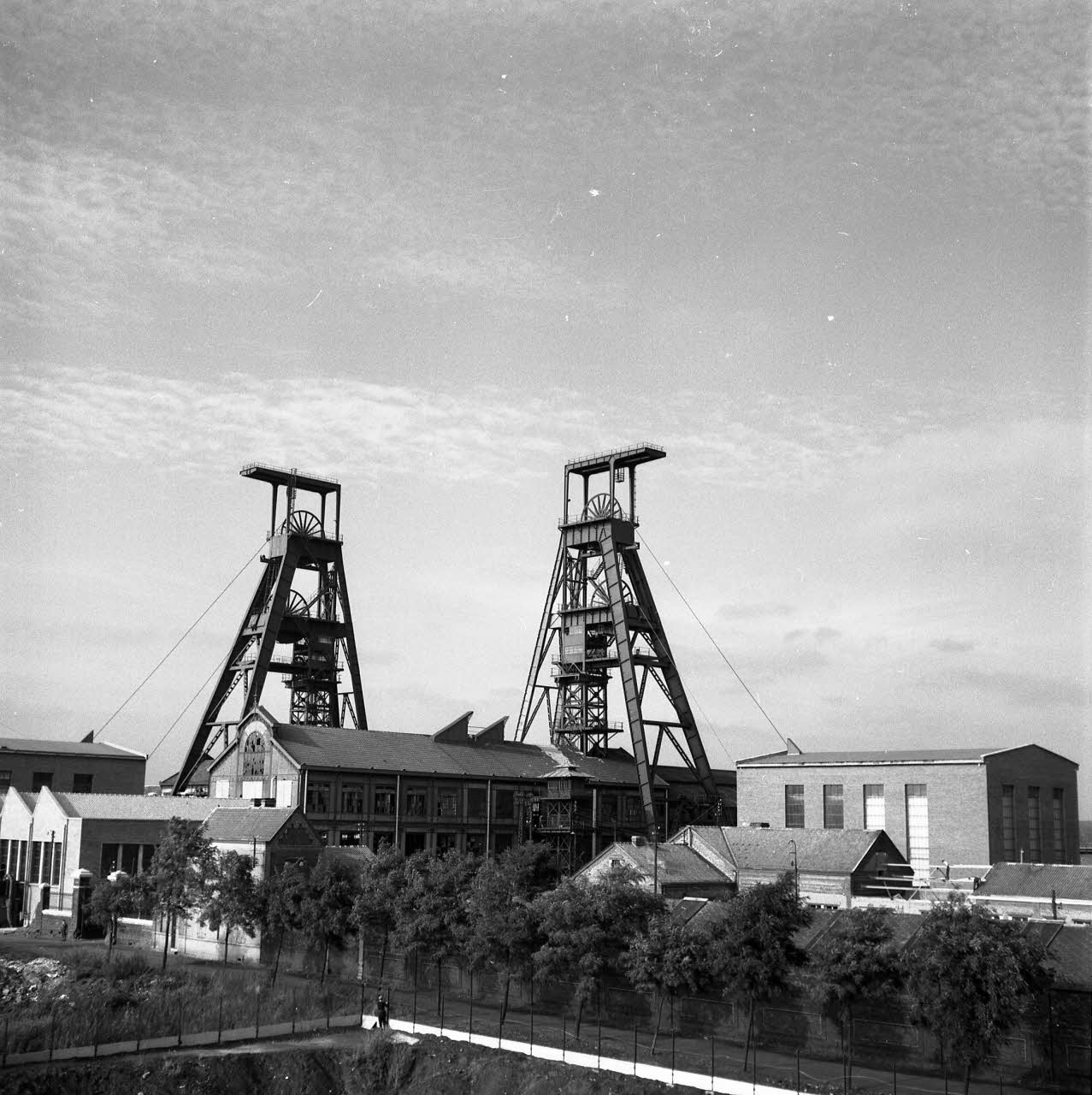 Fosse Ledoux de Condé sur Escaut